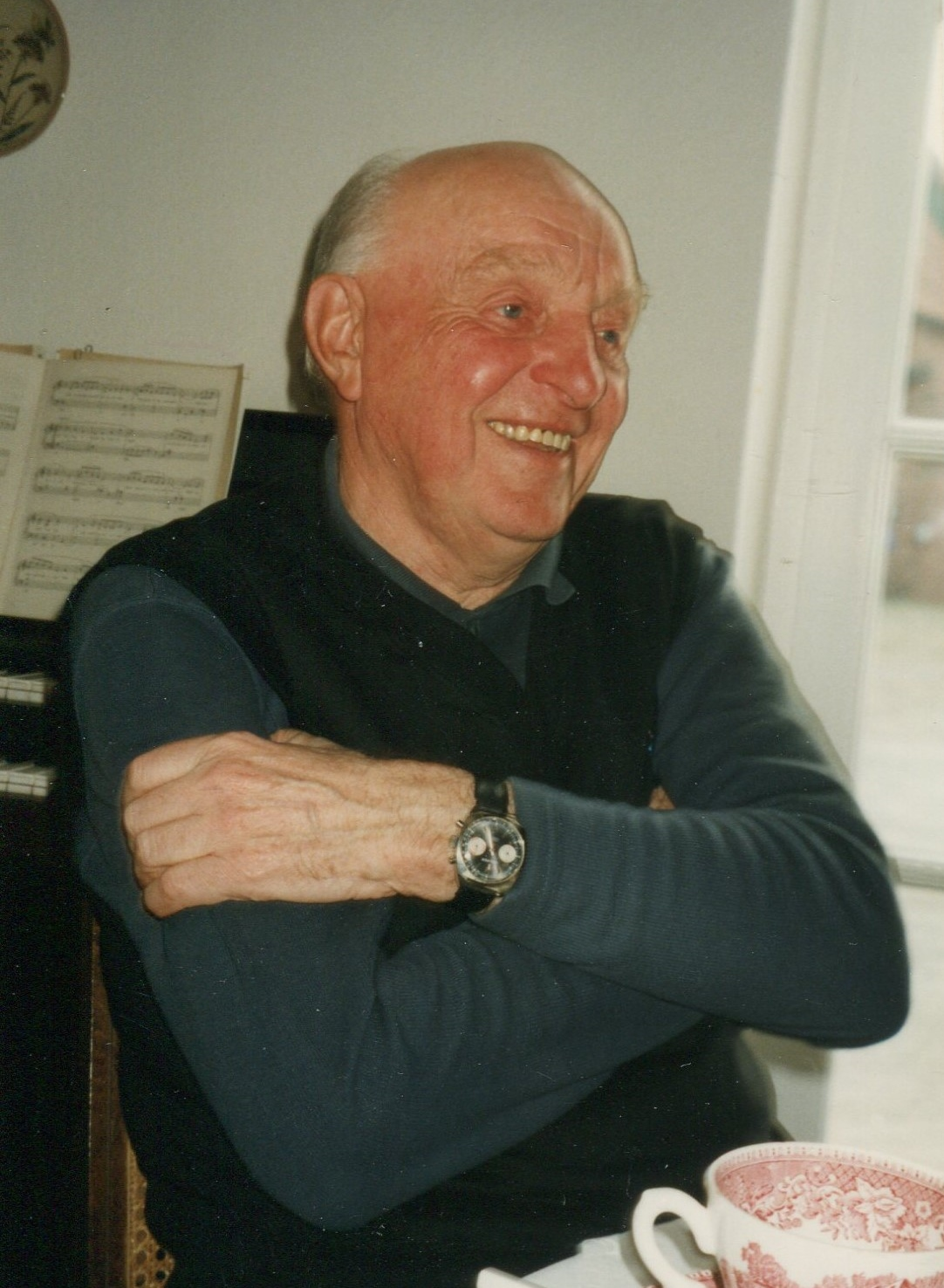 Horst Seifart, Chefredakteur NDR-Regionalprogramm und Sportjournalist